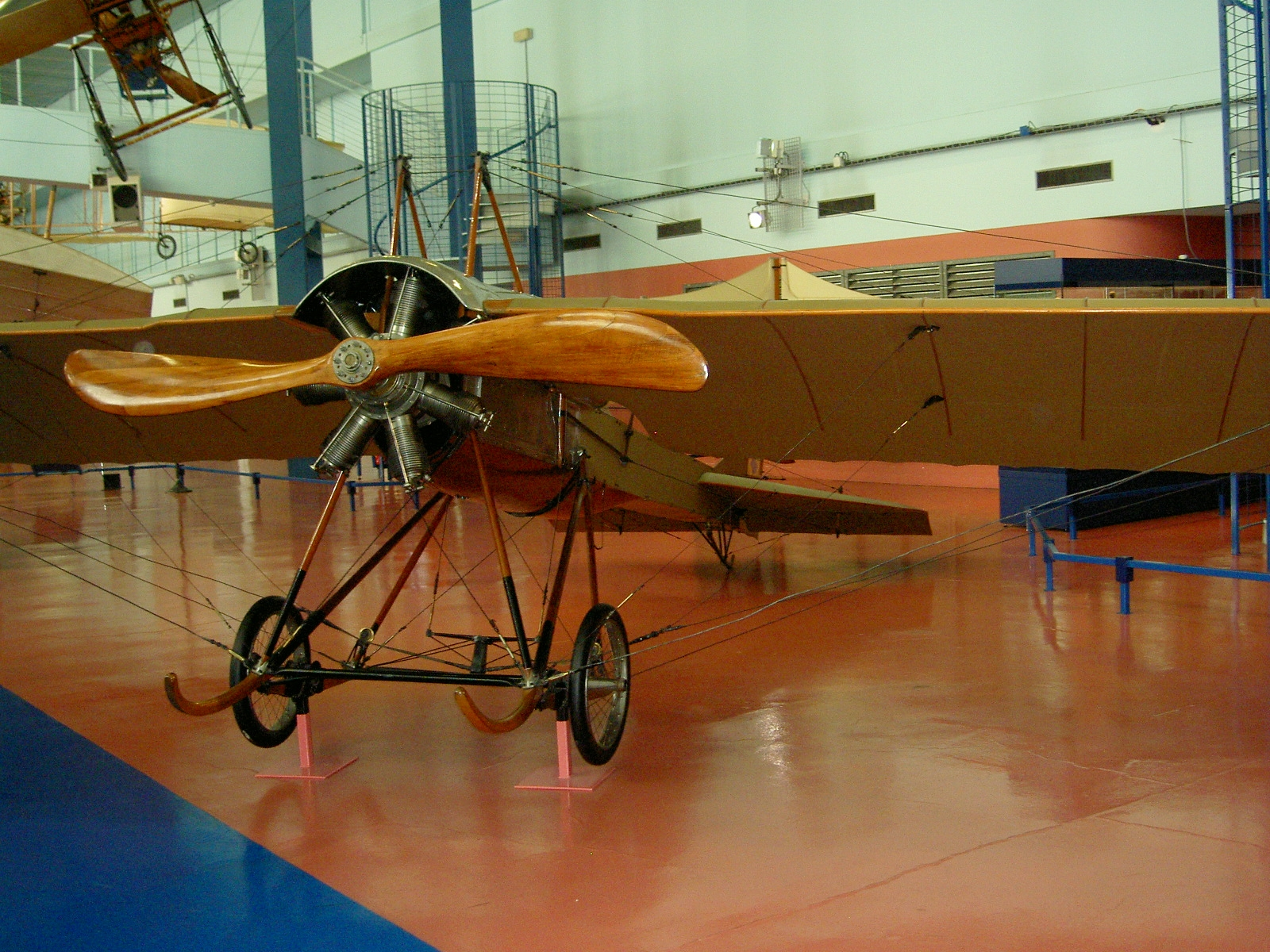 Deperdussin B (French plane)